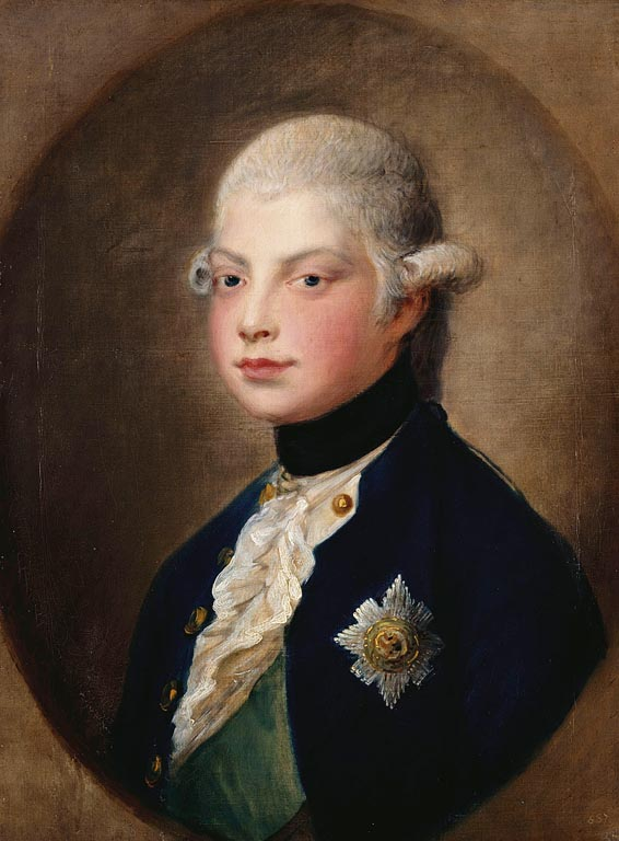 William IV, agé de 17 ans